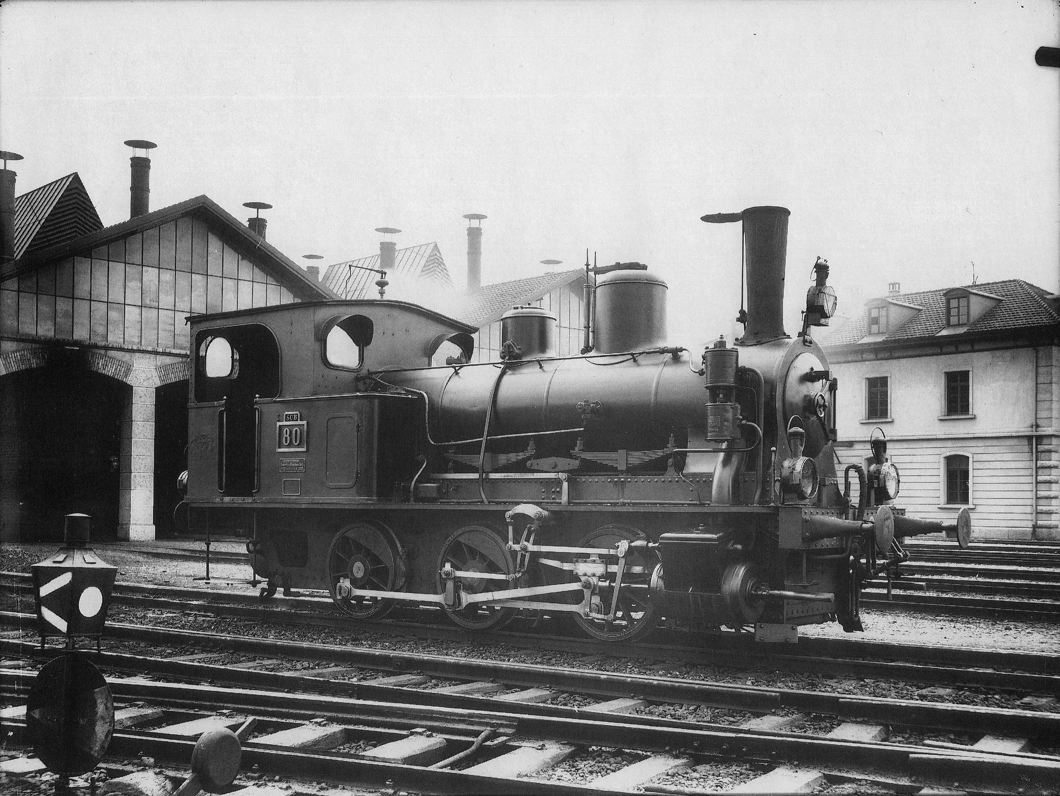 Rangir-Locomotive Nr. 80 des Typs F3 der Schweizeriſchen Centralbahn, gebaut 1896 inn der Schweizeriſchen Locomotiv- und Machines-Fabrique zů Winterthur (Fabricationsnr. 957), aufgnommen im Fahrzeug-Dépôt zů Baſel um 1900; ab 1902 E 3/3 Nr. 8425 der Schweizeriſchen Bundesbahnen, ab 1945 Nr. 7802 der Niderländiſchen Eiſenbahnen, 1948 abgebrochen.